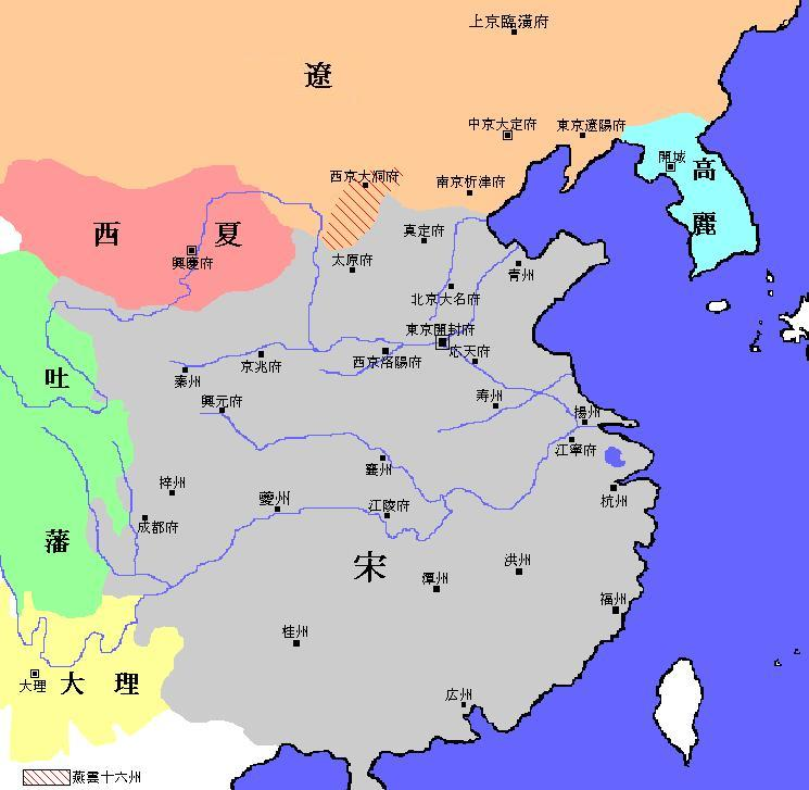 十一世紀北宋